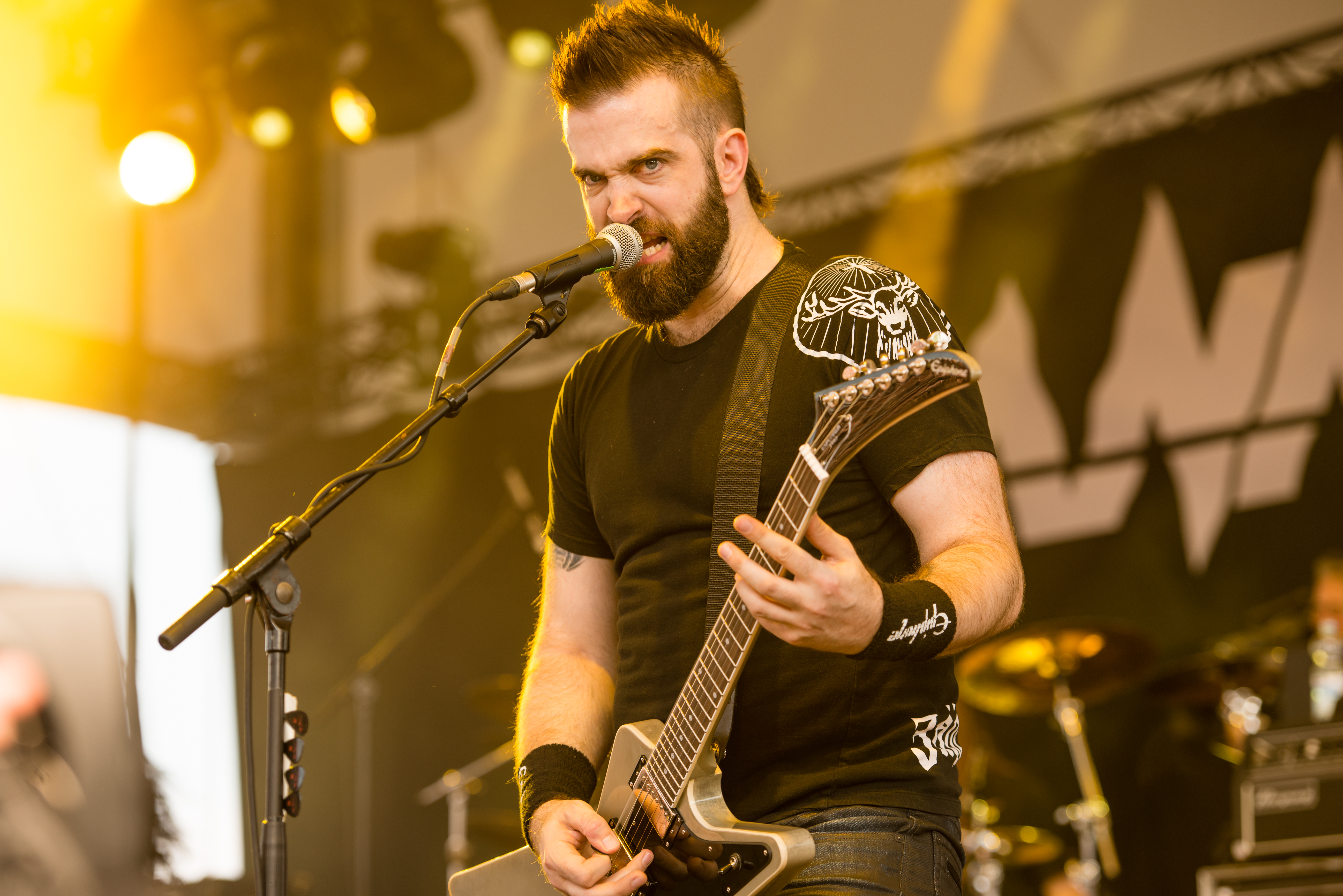 'Rock Hard Festival 2014 - Gelsenkirchen': 'Annihilator'